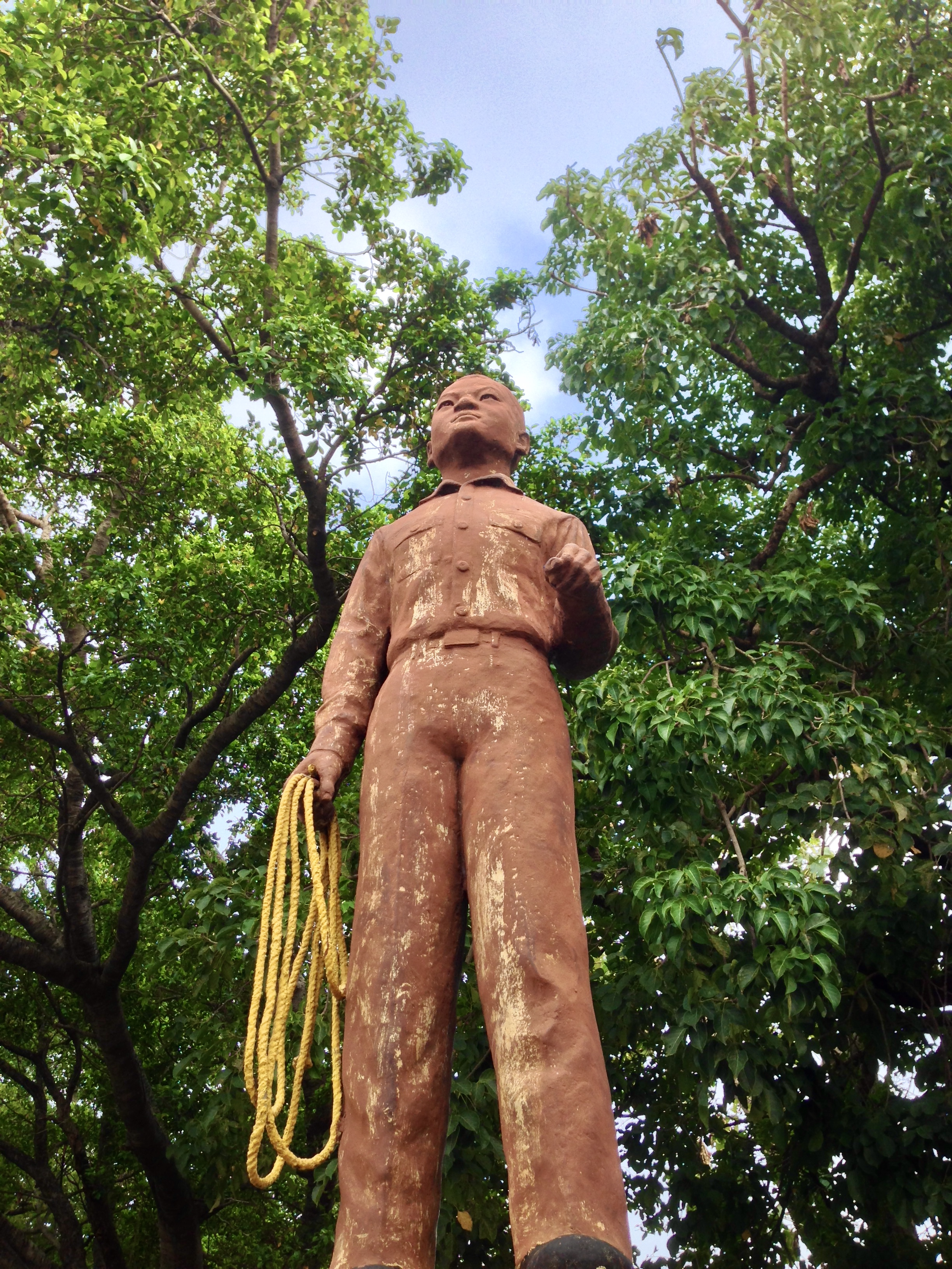 李益勝銅像